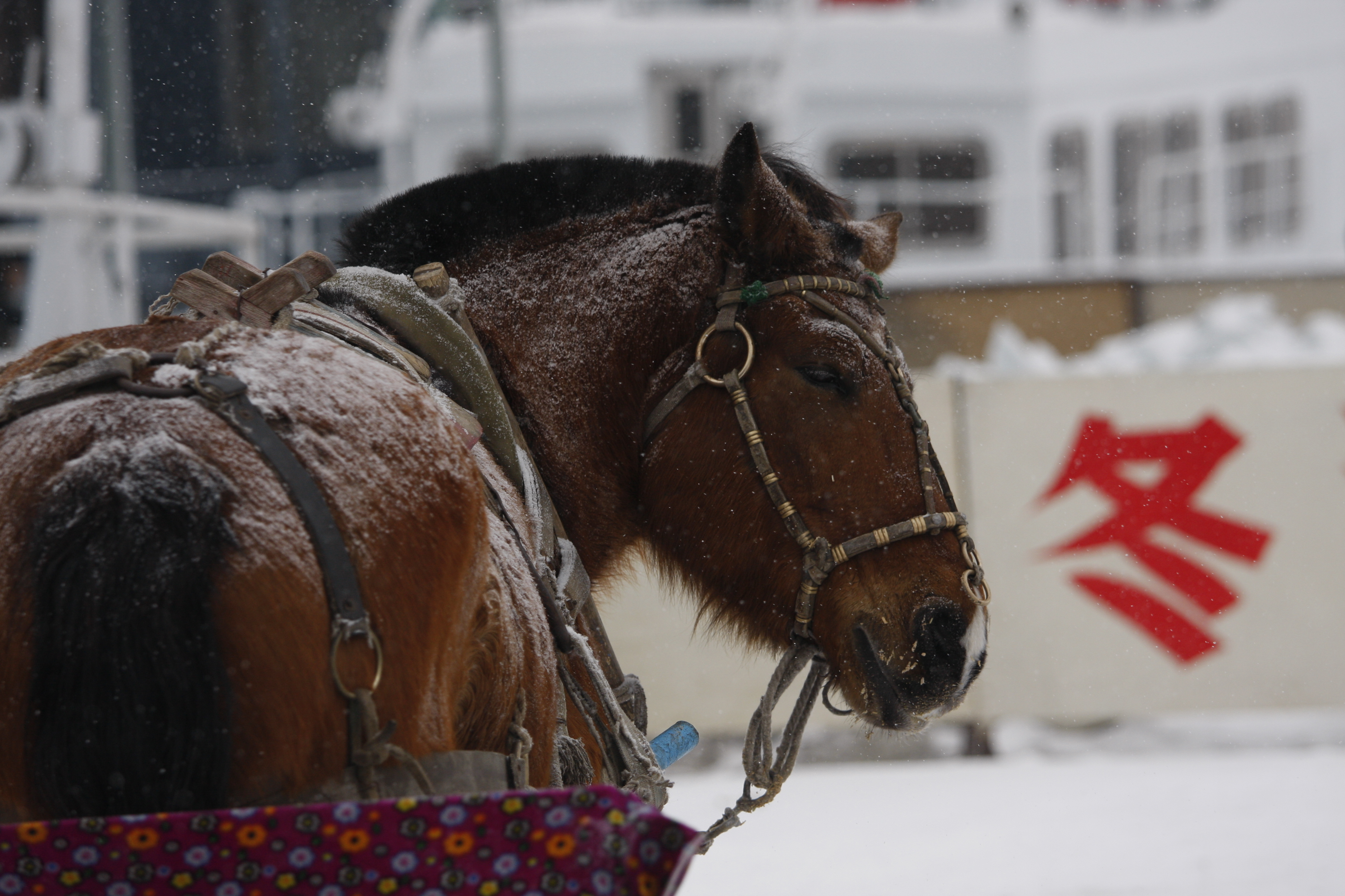 Cheval attelé à Harbin, Heilongjiang, situé en Mandchourie en Chine.